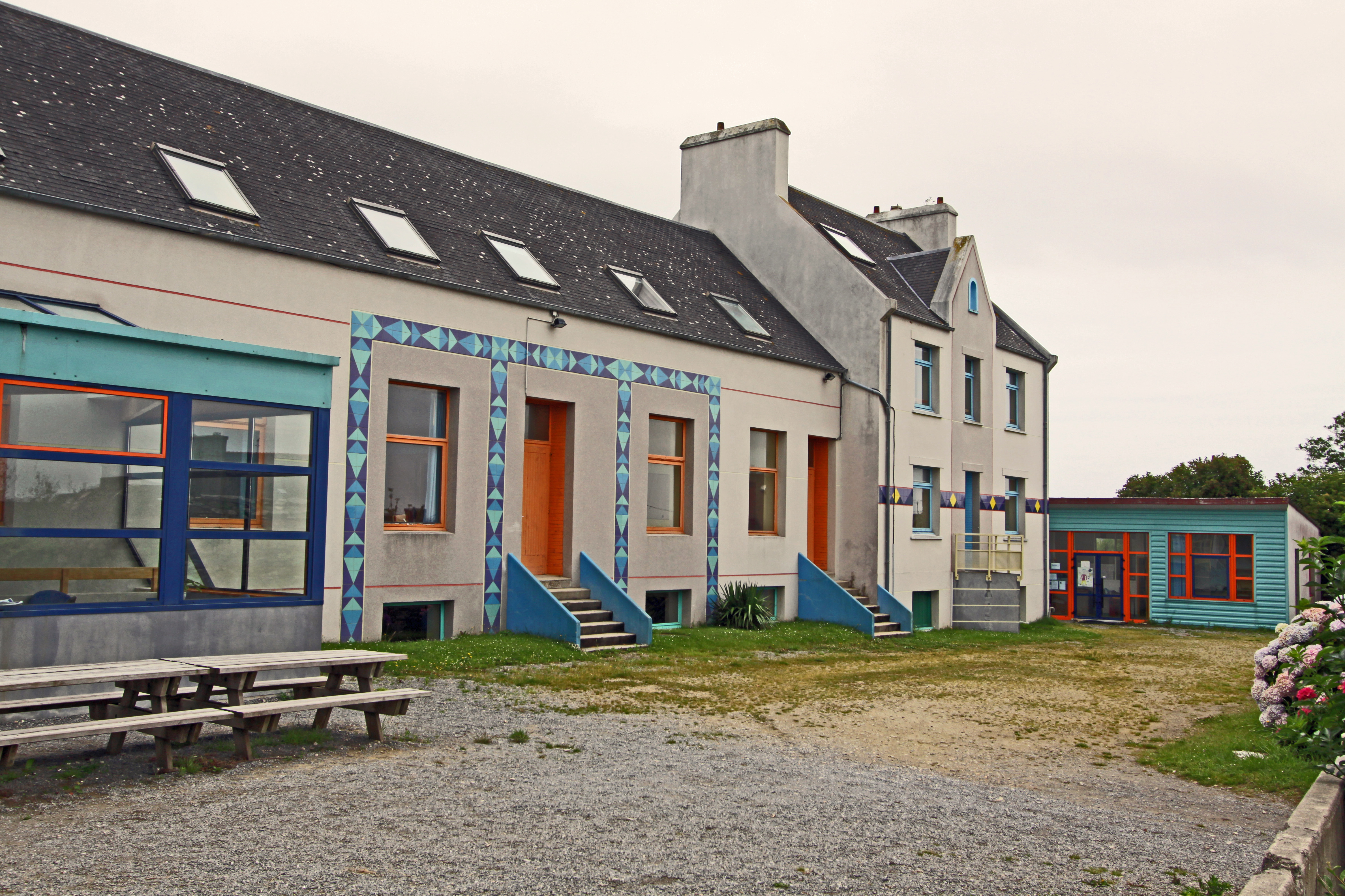 École Diwan de Tréglonou